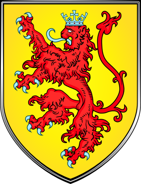 Coat of Arms of Kilikia - Cilicia